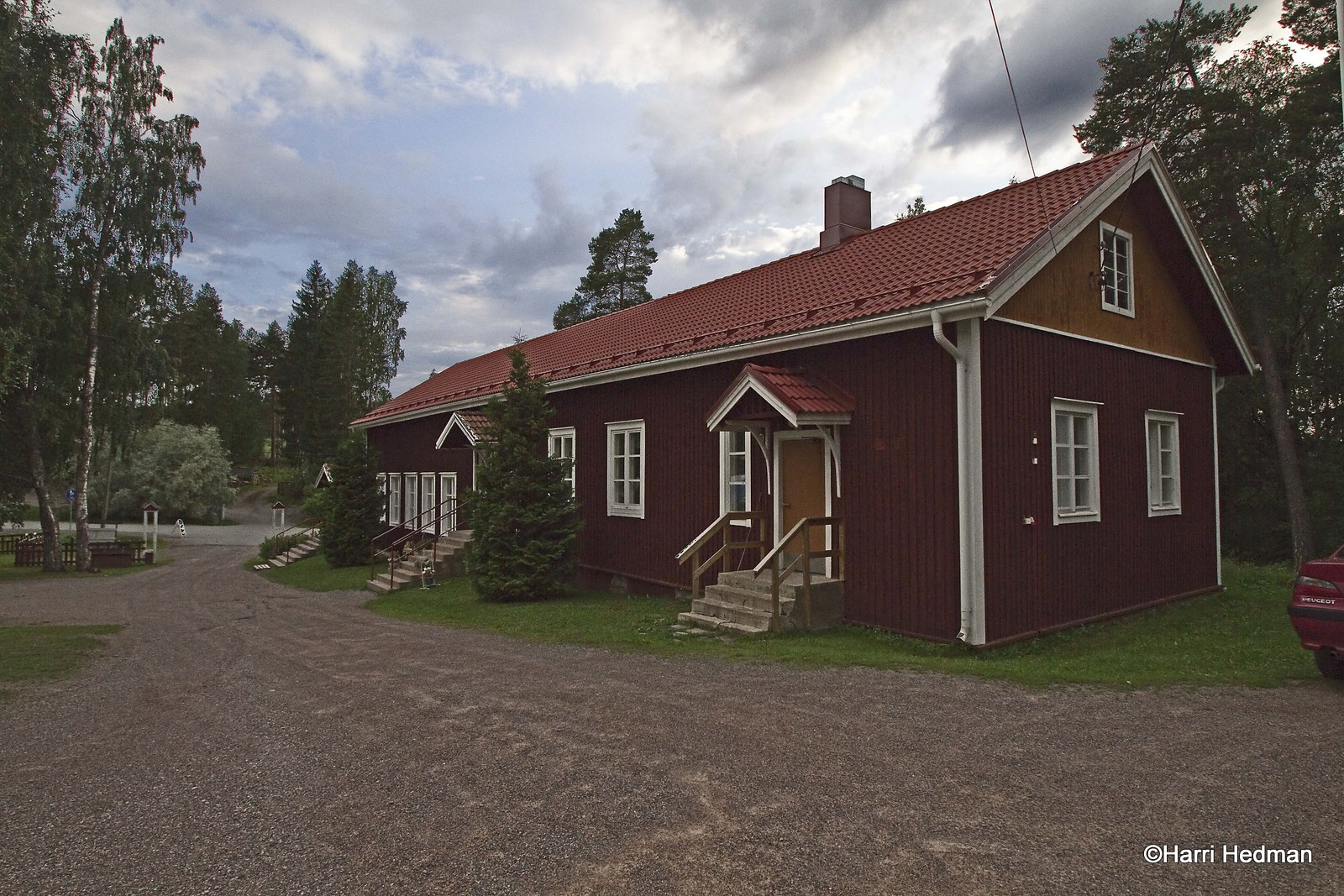 Jumesniemen kylätalo